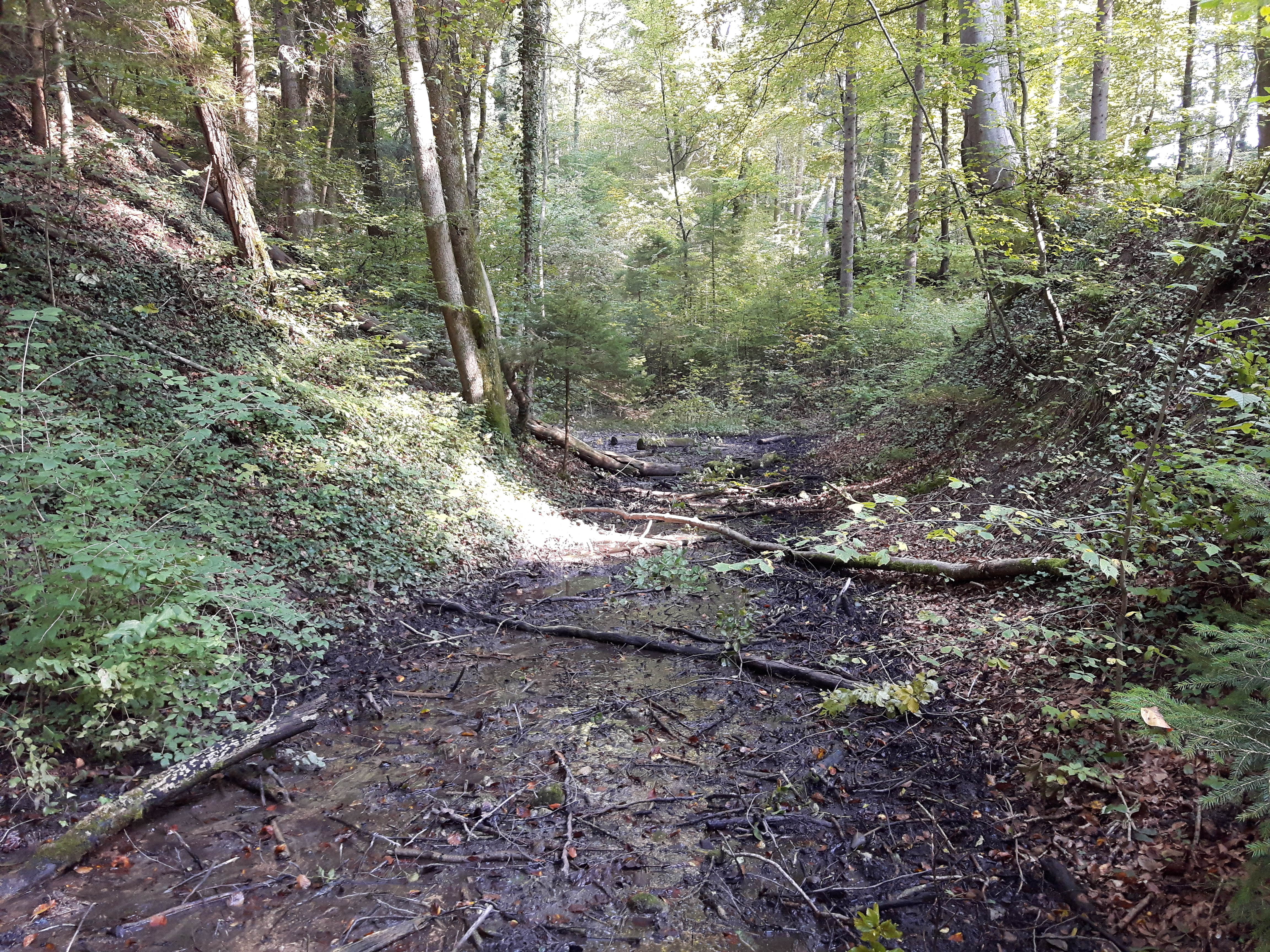 Sumpfiges Rinnsal im Loch, Oberengstringen